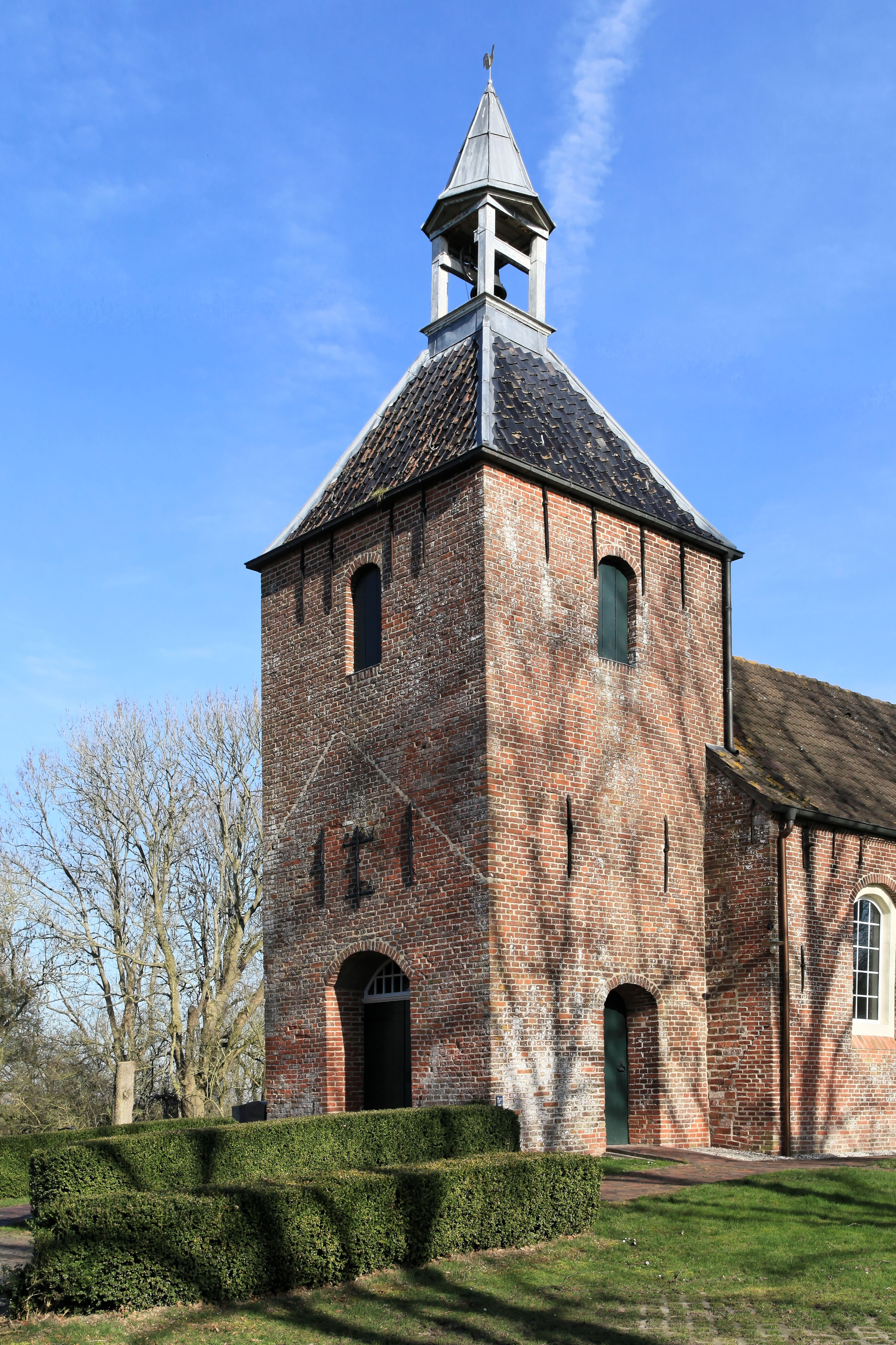 Kirche, Nendorper Straße in Nendorp, Jemgum